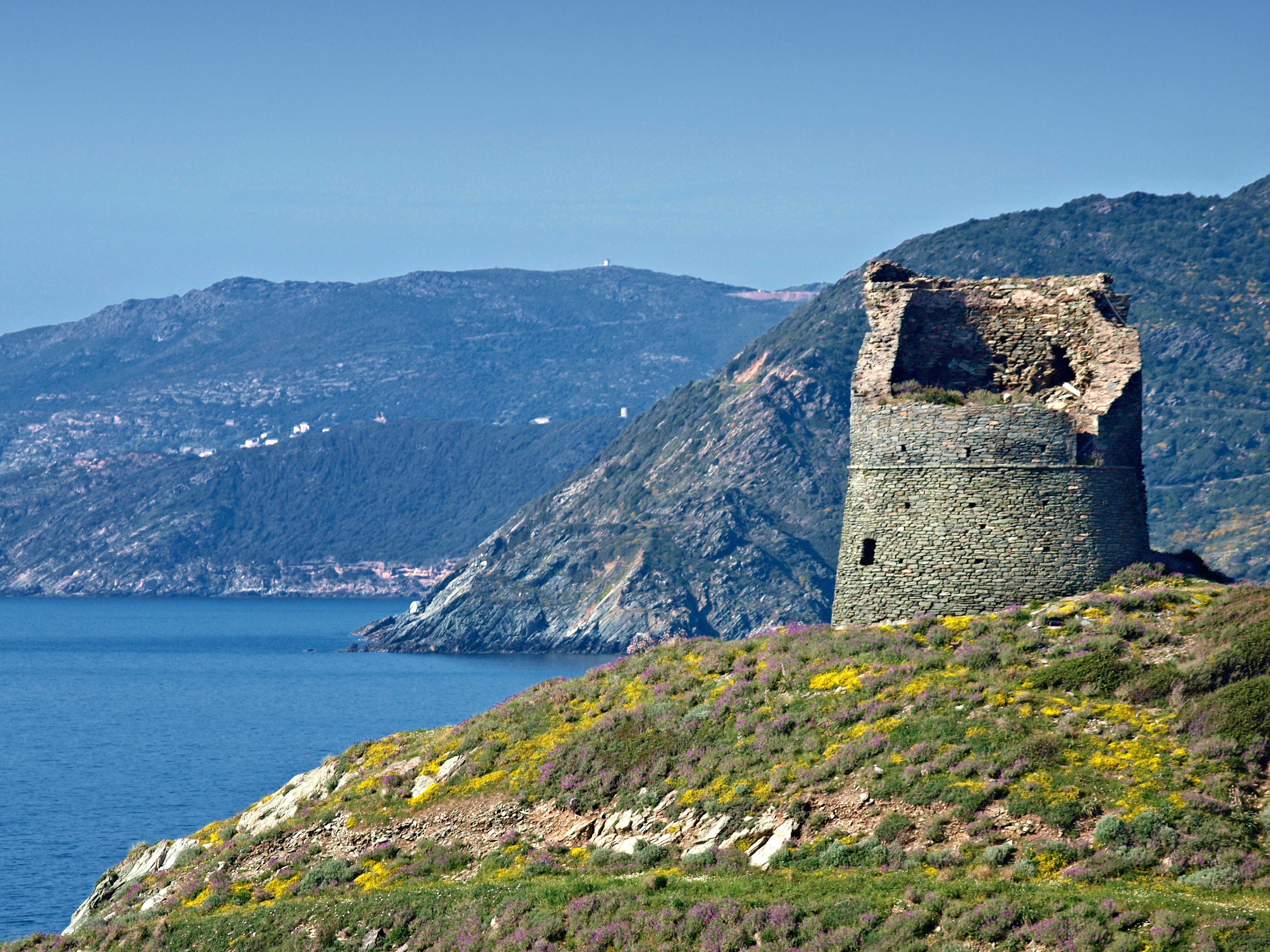 Pino (Corsica) - Tour de Scalo